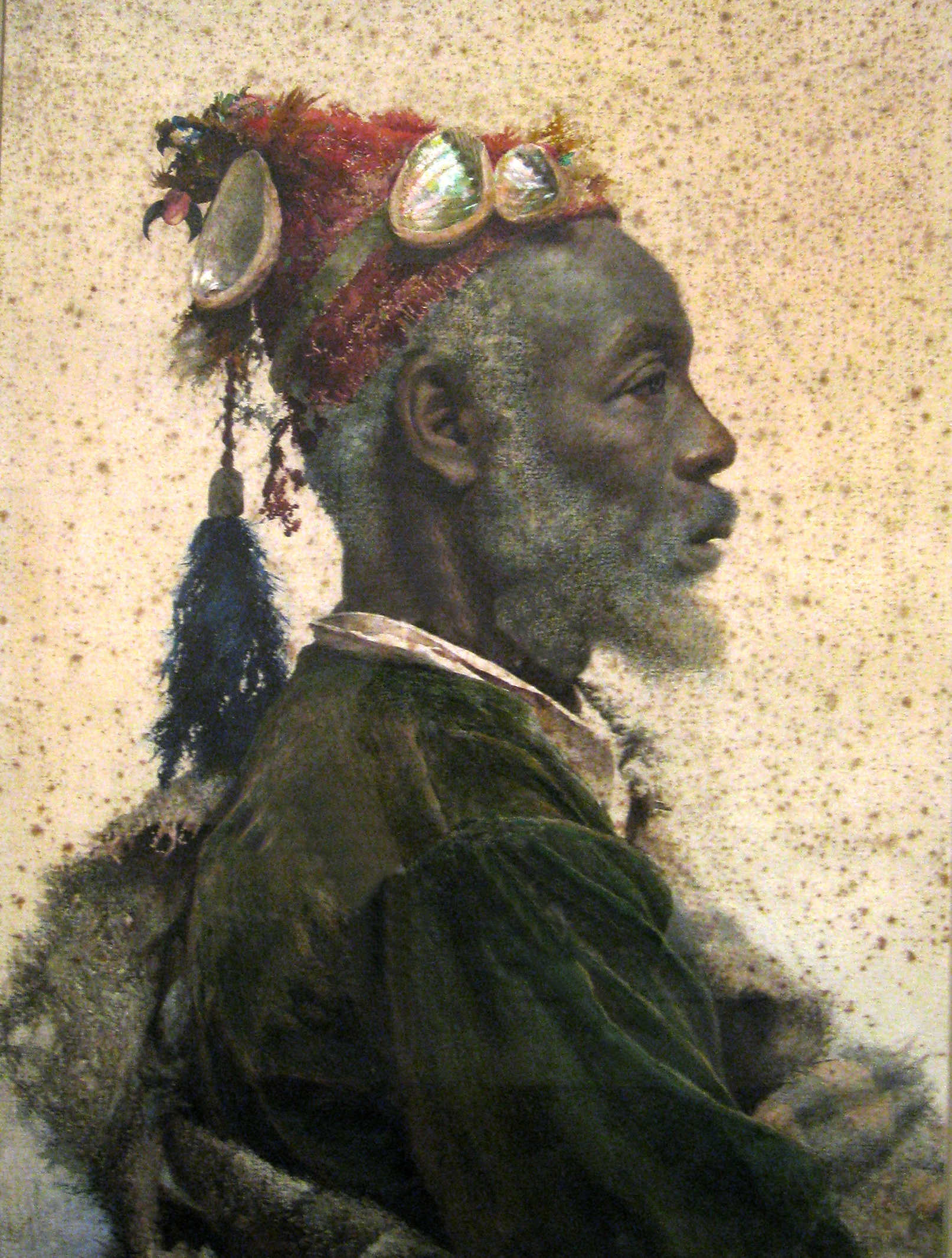 Retrat del santó Darcagüey. Aquarela de Josep Tapiró (1890). MNAC